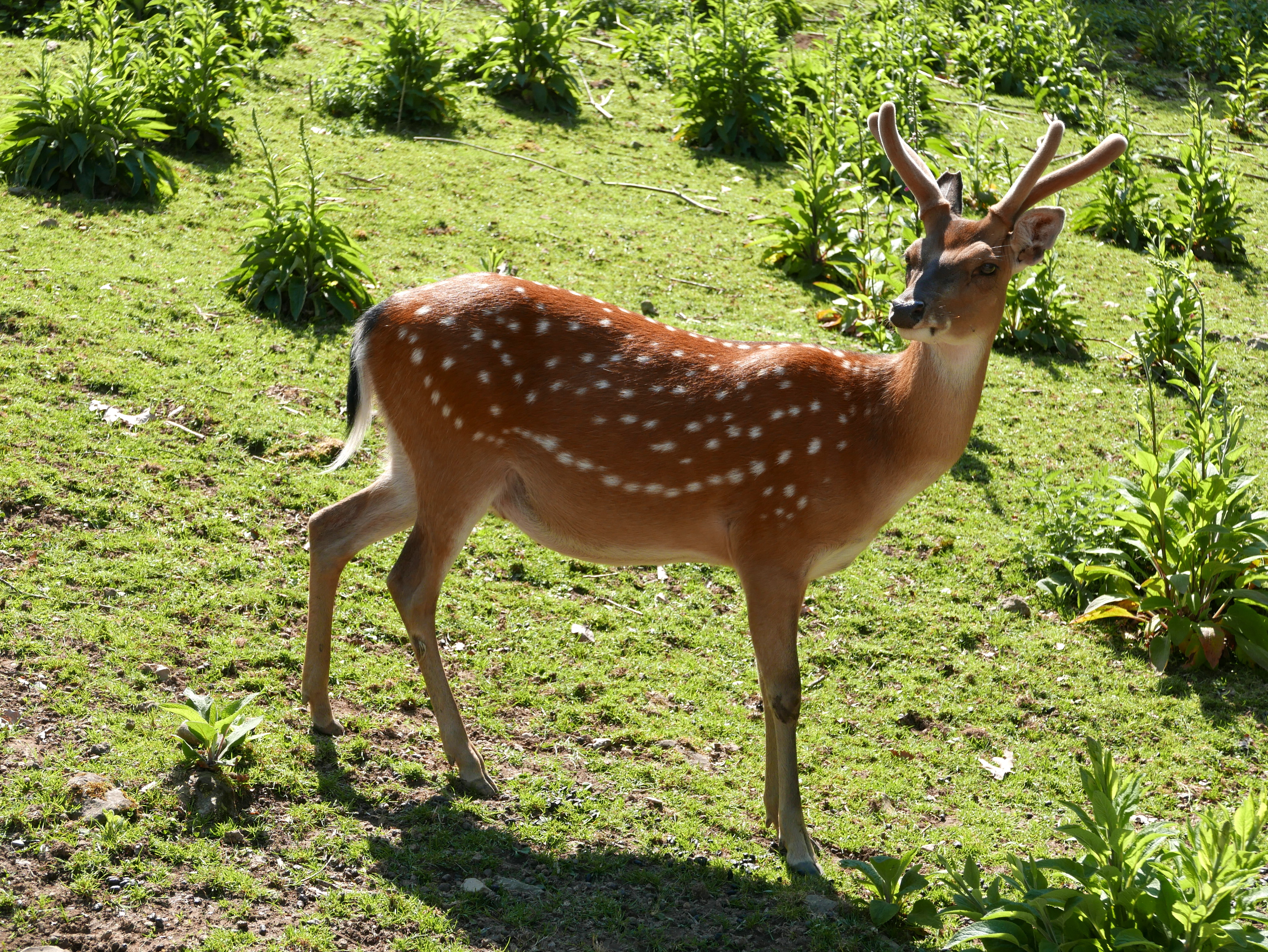 Vietnamesischer Sikahirsch im Schwarzwaldzoo Waldkirch, Landkreis Emmendingen